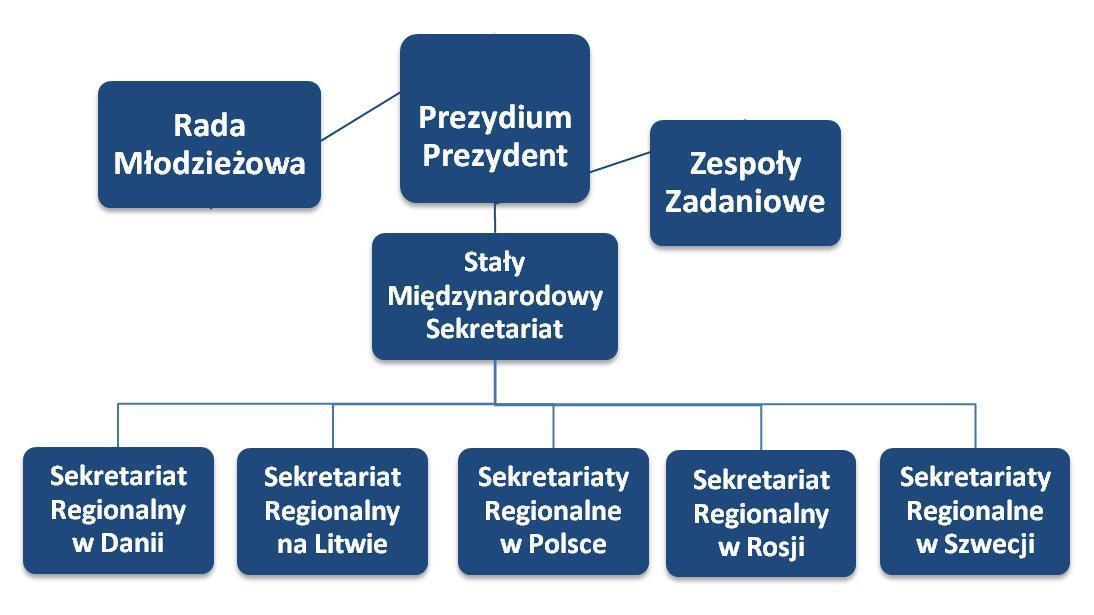 Struktura organizacyjna Euroregionu Bałtyk po reformie w roku 2010.